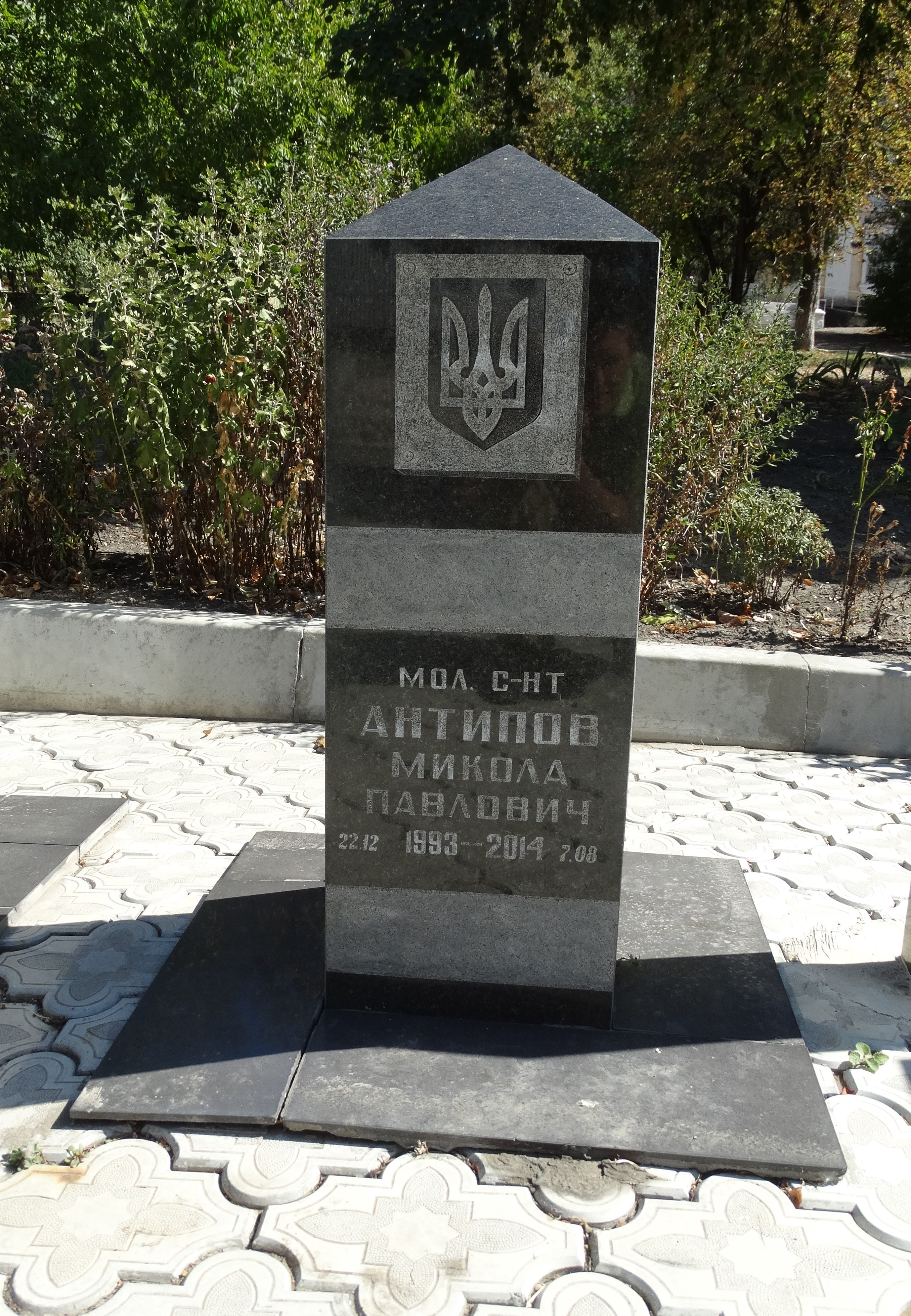 Вікіекспедиція на північ Одещини